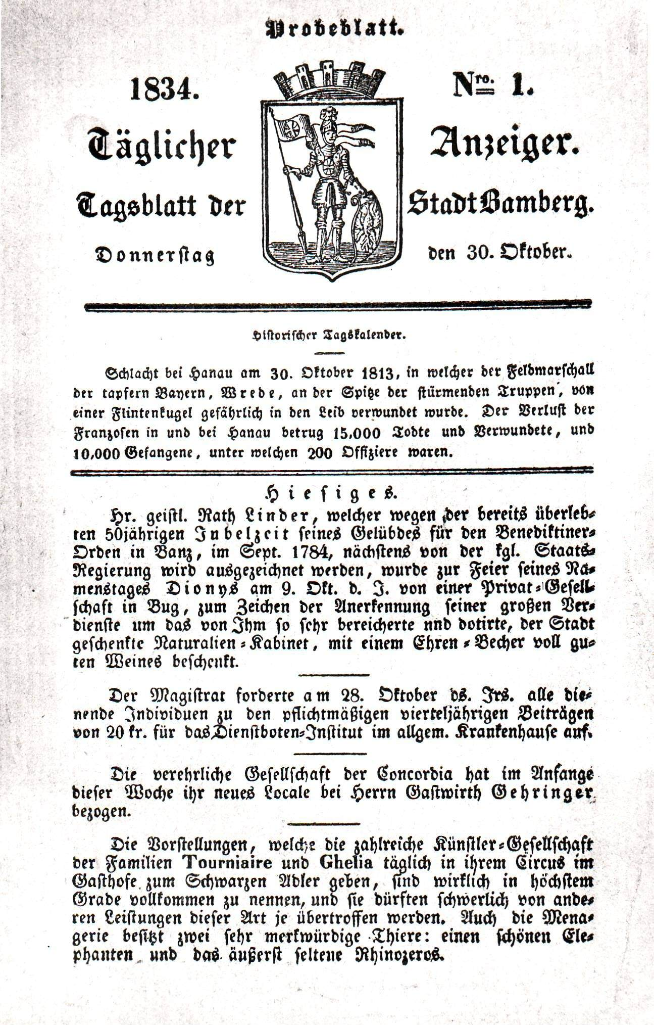 Ausgabe des "Täglichen Anzeigers" als Vorläufer des Fränkischen Tags aus dem Jahr 1834